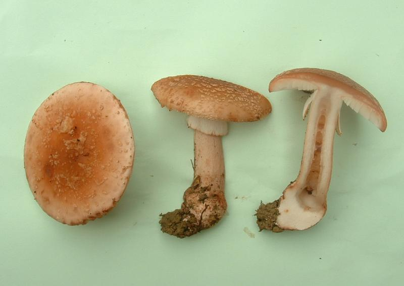 Ananite vineuse (Amanita rubescens), Étrelles-et-la-Montbleuse (Haute-Saône, France), octobre 2004.